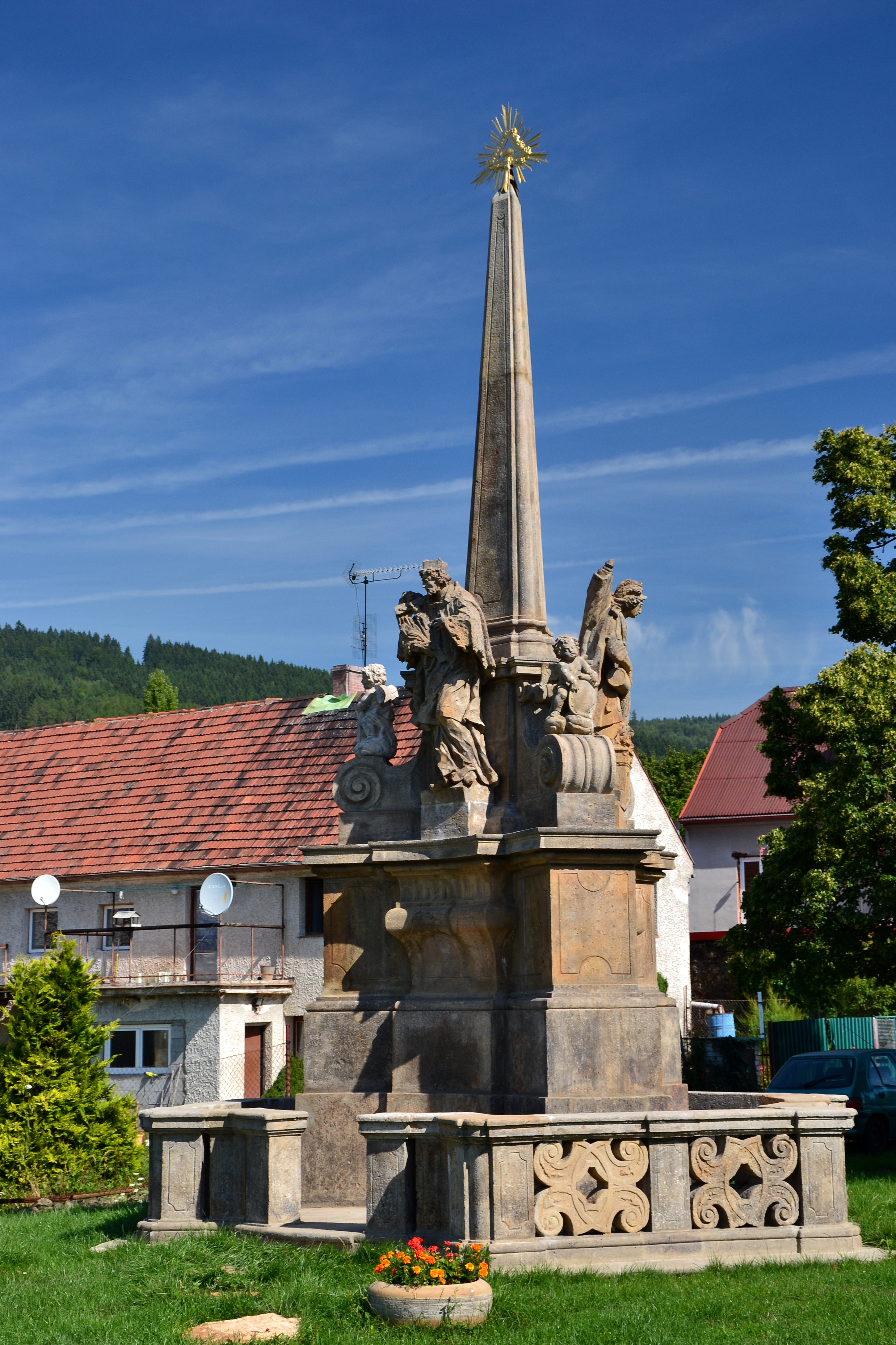 Sloup se sousoším Nejsvětější Trojice (Libědice), v roce 2012 přesunutý do Zelené u Chomutova